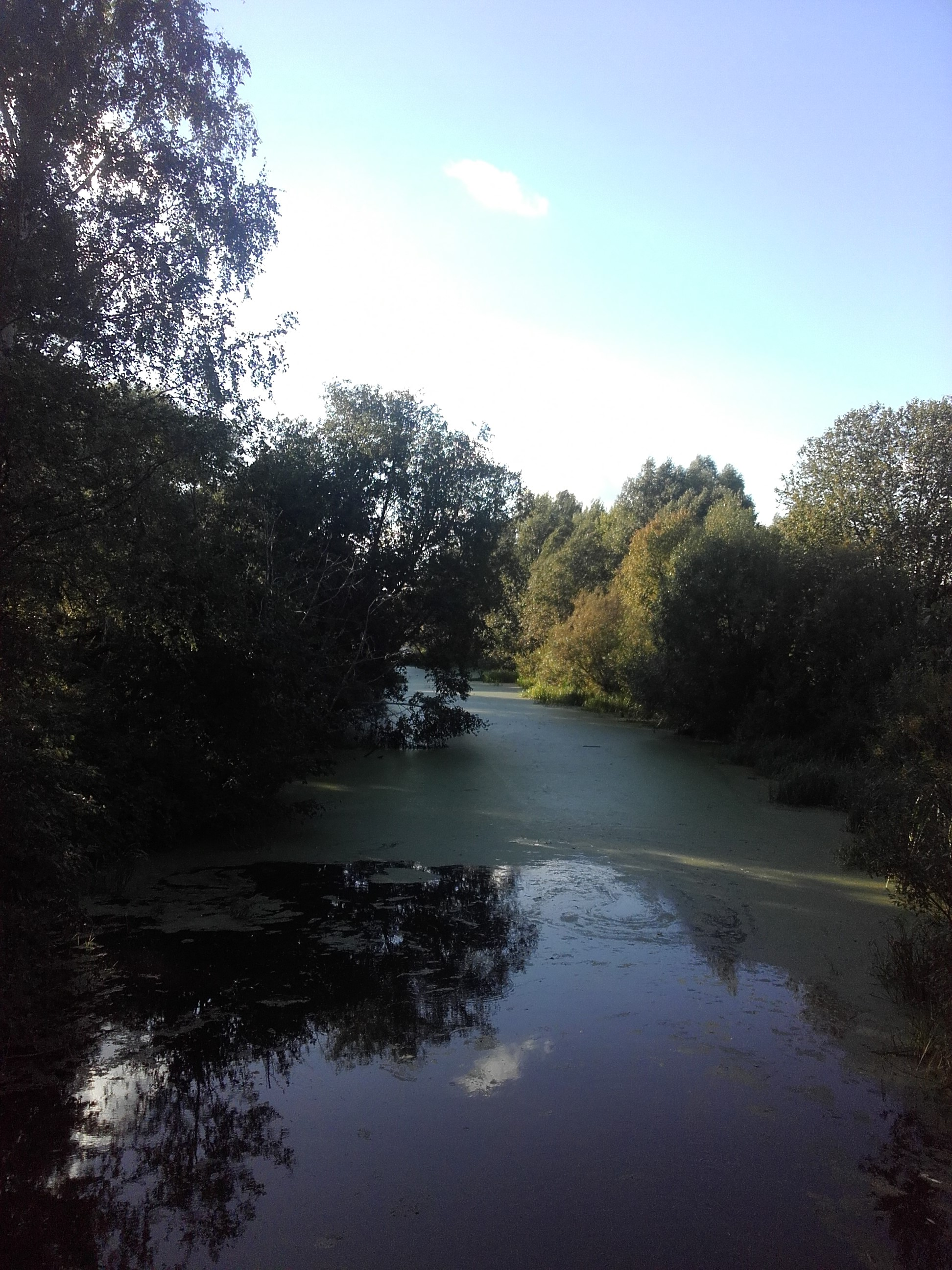 Протока старицы Москвы-реки